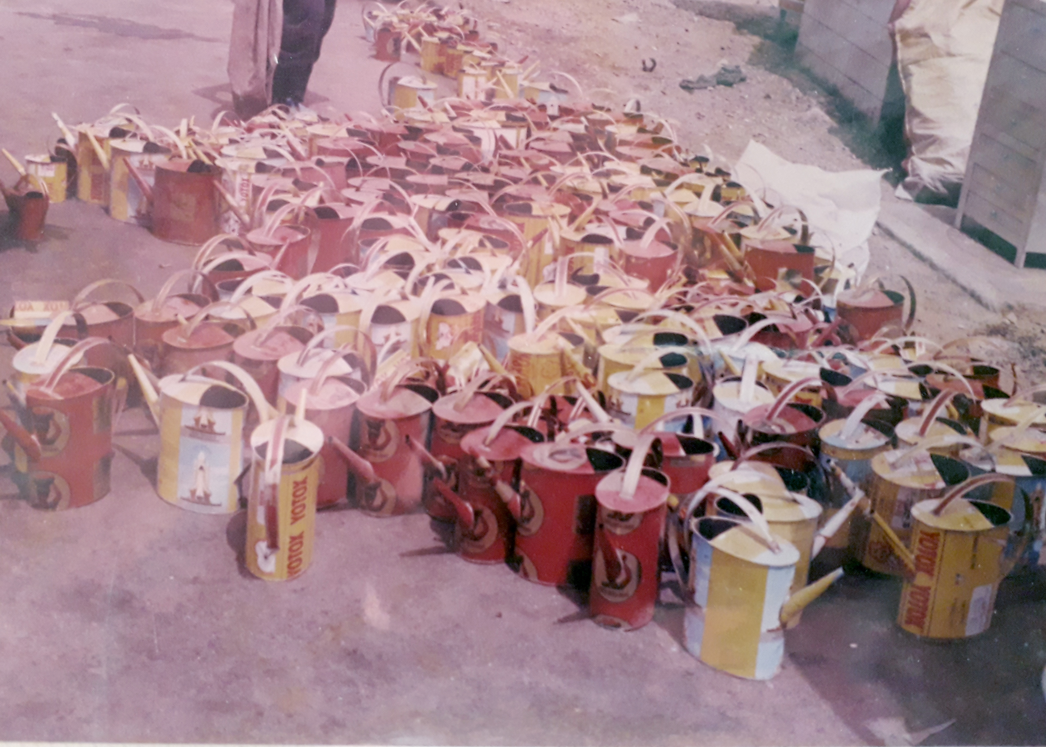 Commande d'arrosoir attendant livraison dans une rue de Niayes Thioker, Dakar